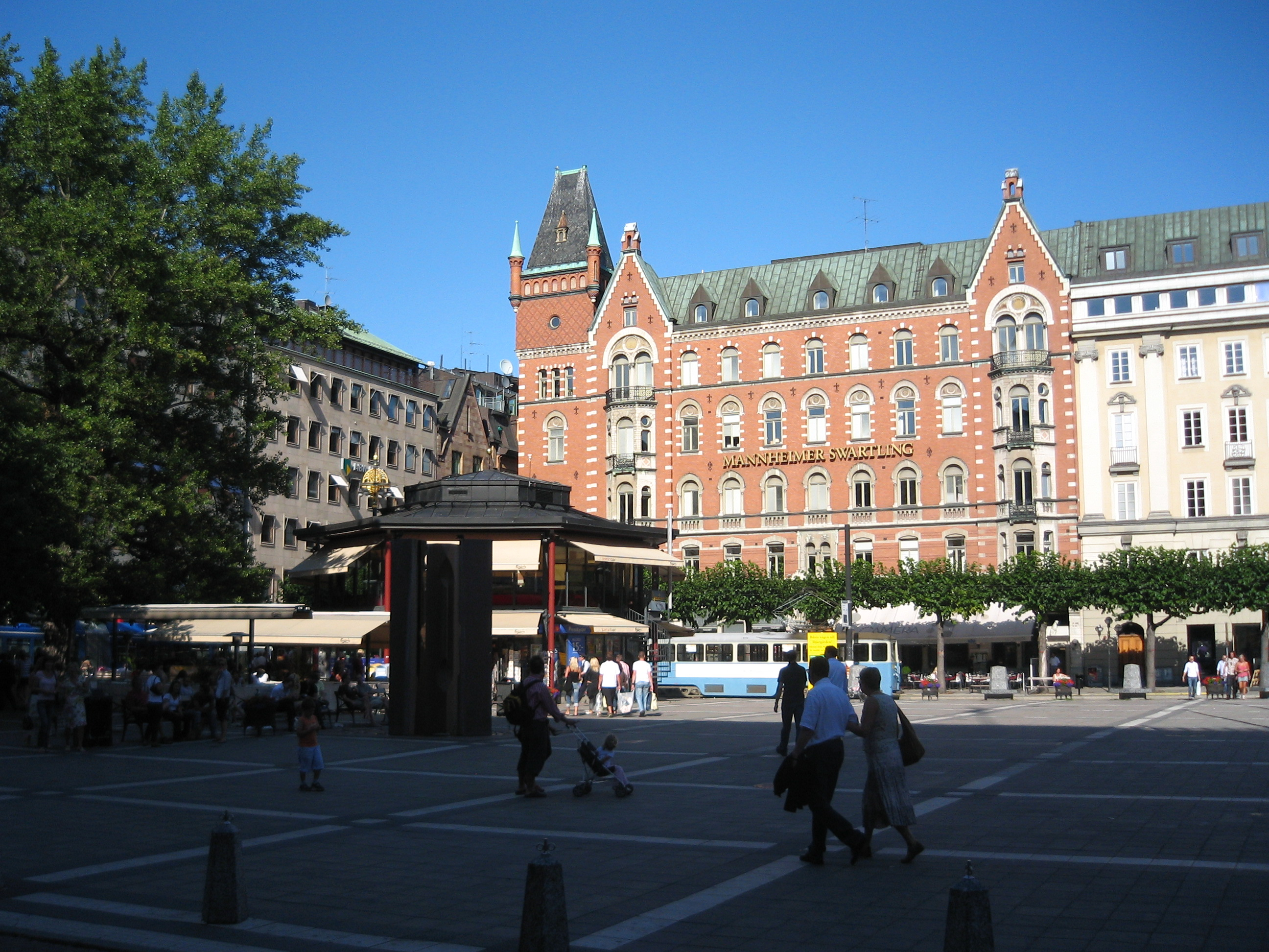 Norrmalmstorg